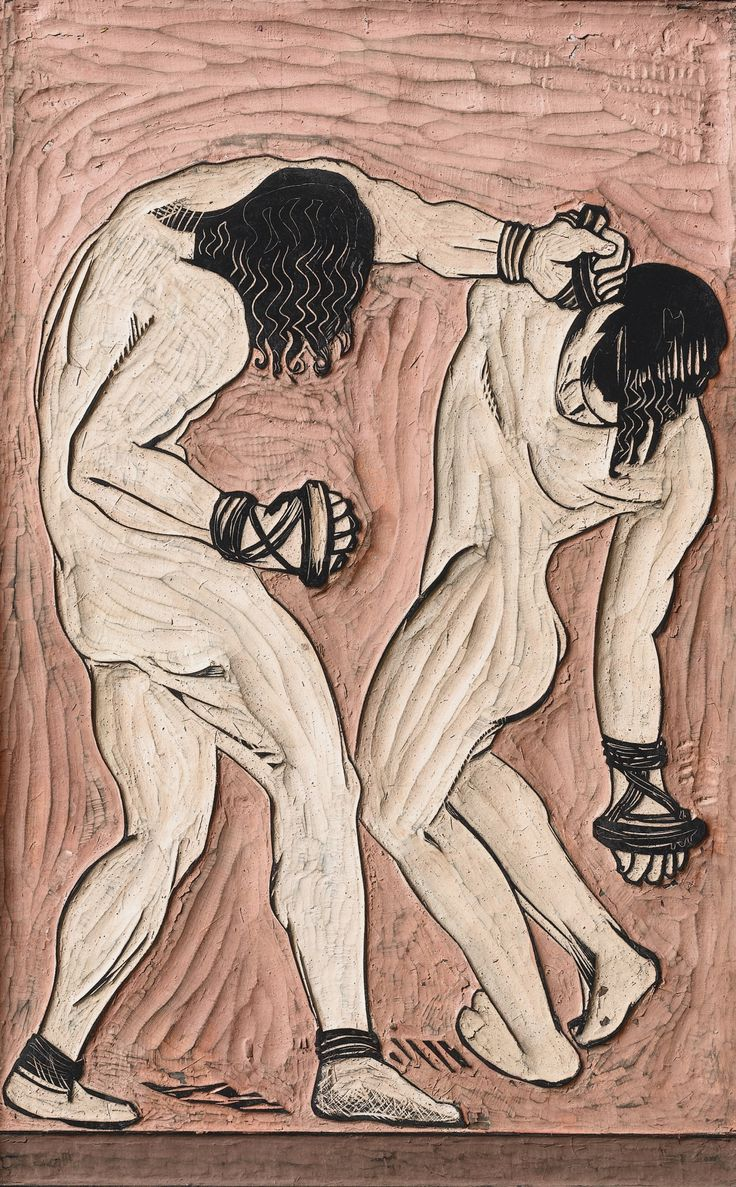 François-Louis Schmied, [1873 - 1941], Les Lutteurs, vers1925, panneau original en bois sculpté et colorié pour impression en couleurs.